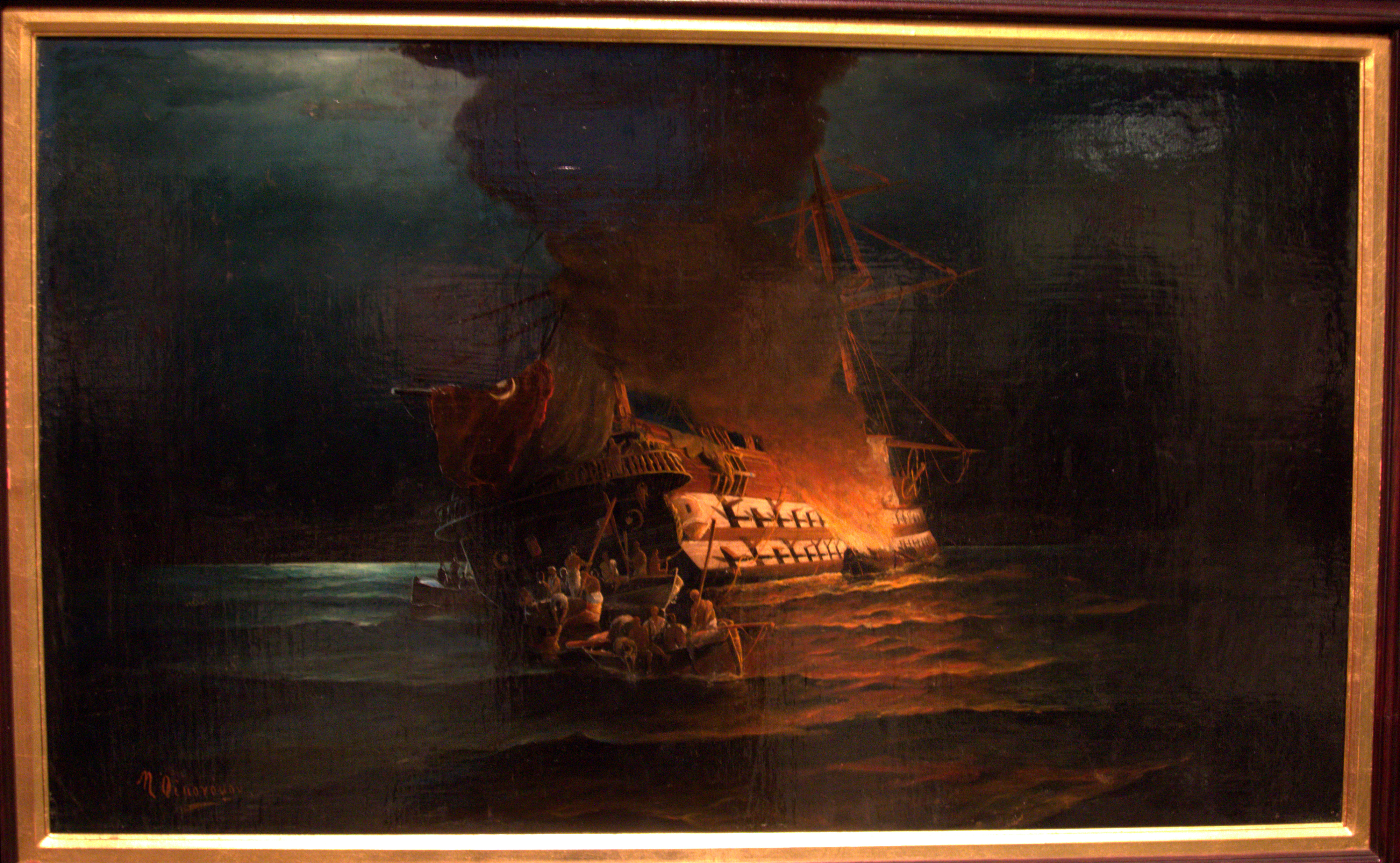 "Πυρπόληση Τουρκικού Δίκροτου". Έργο Μ. Οικονόμου.